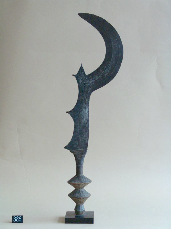 ARMA RITUALE (decapitazione)